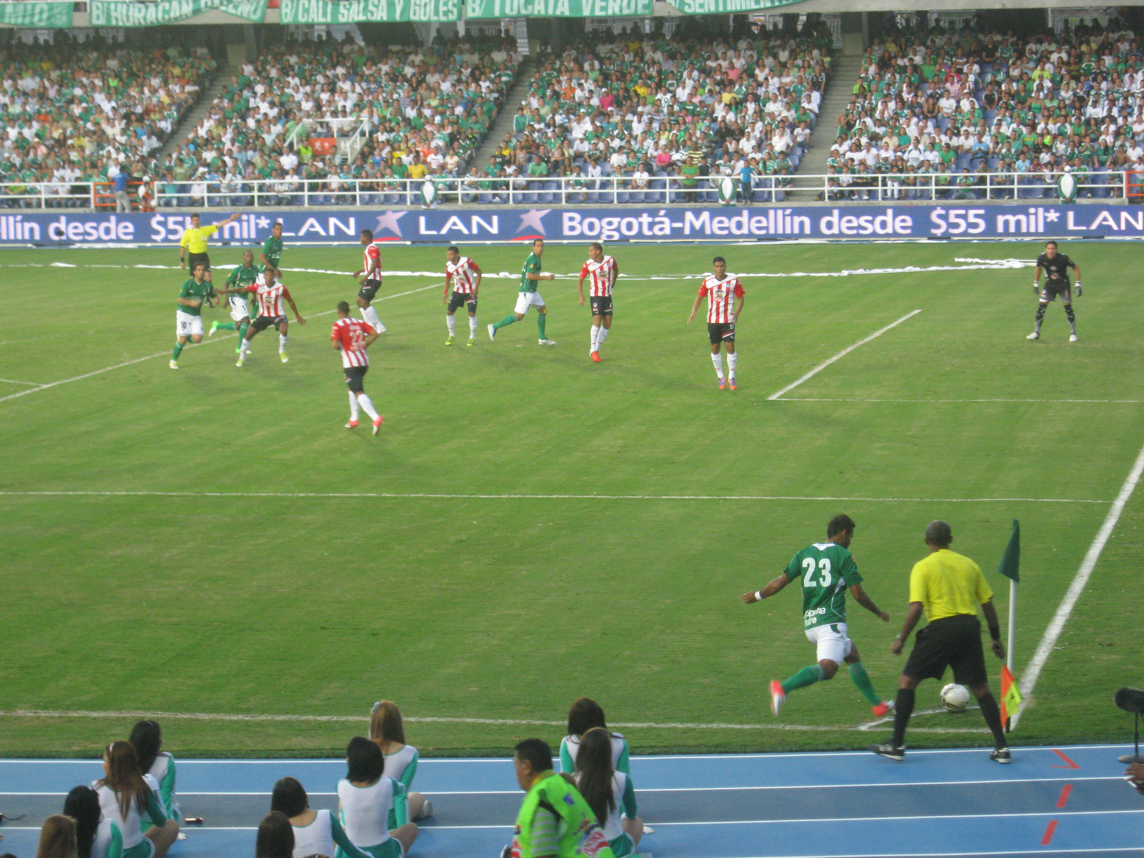 El Glorioso Deportivo Cali vs junior. 4 fecha.